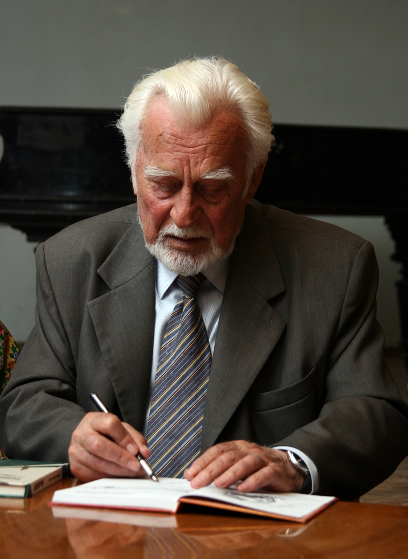 Роман Иванычук, украинский литератор